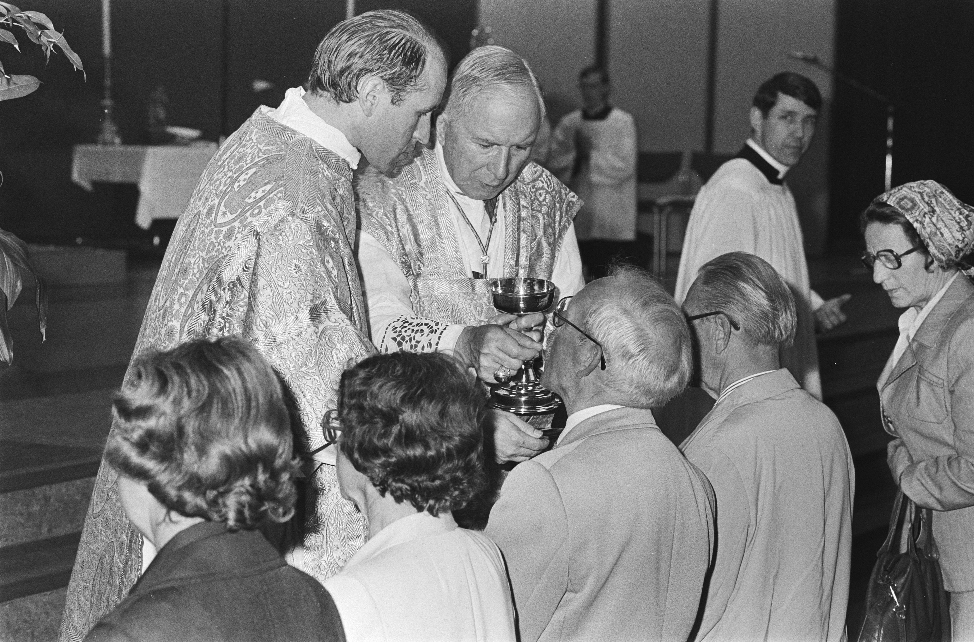 In Veldhoven heeft de uit zijn ambt ontheven Franse aartsbisschop Lefebvre een mis opgedragen volgens de oude ritus.